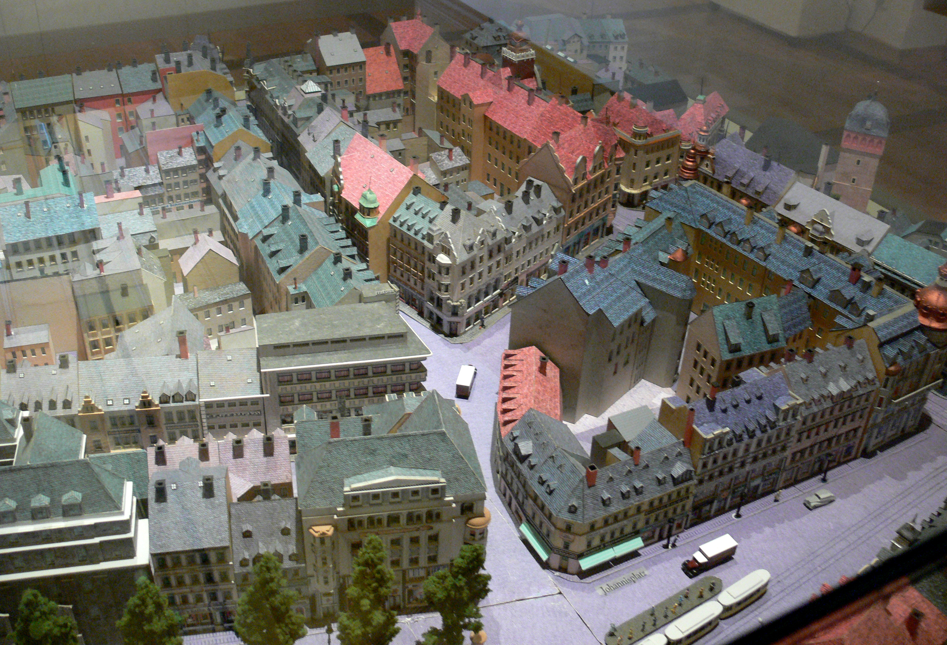 Modell der Chemnitzer Innenstadt (vor der Zerstörung im Zweiten Weltkrieg) Schloßbergmuseum Chemnitz